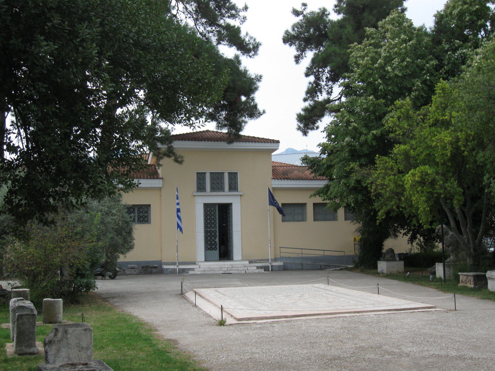 Museum Limenas